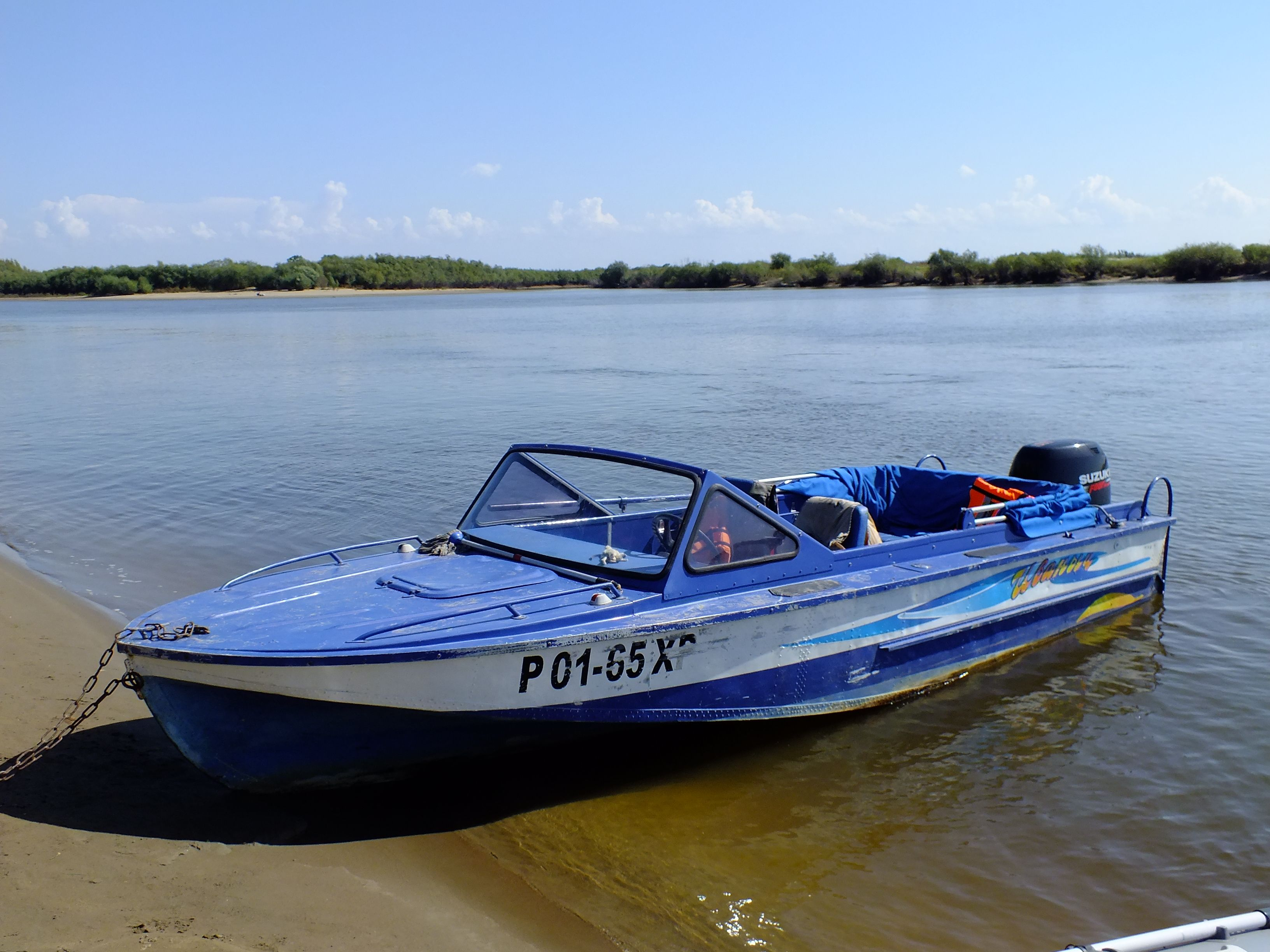 Катер Амур с мотором Сузуки-115